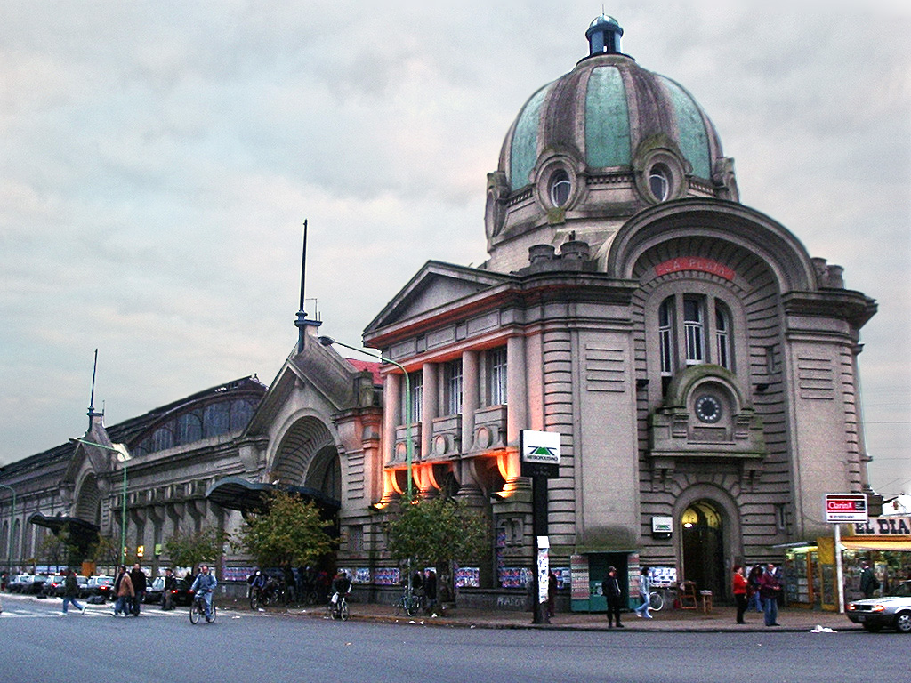 Estación del Ferrocarril Roca, La Plata, Provincia de Buenos Aires, Argentina.Estacion La Plata